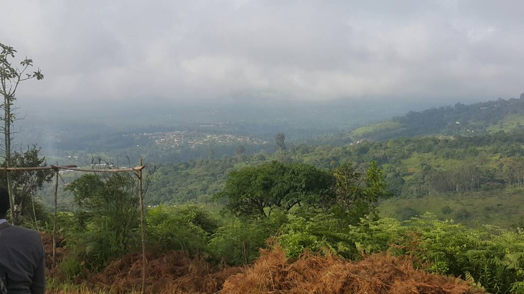 Vue aérienne de Bangangté, Vallée, Ouest Cameroun